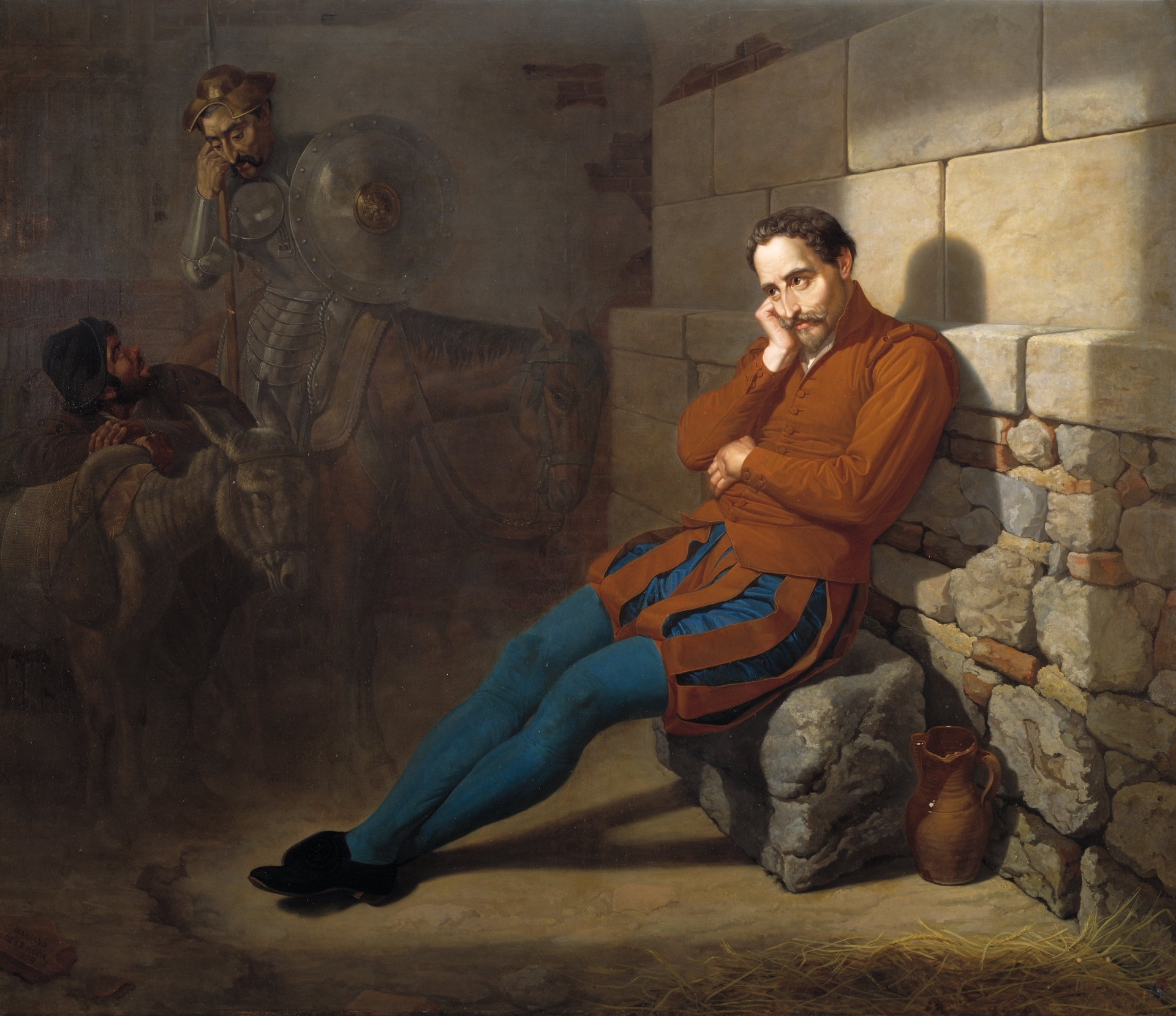 La obra representa al insigne escritor español Miguel de Cervantes Saavedra (1547-1616), imaginando su obra más famosa, Don Quijote de la Mancha.